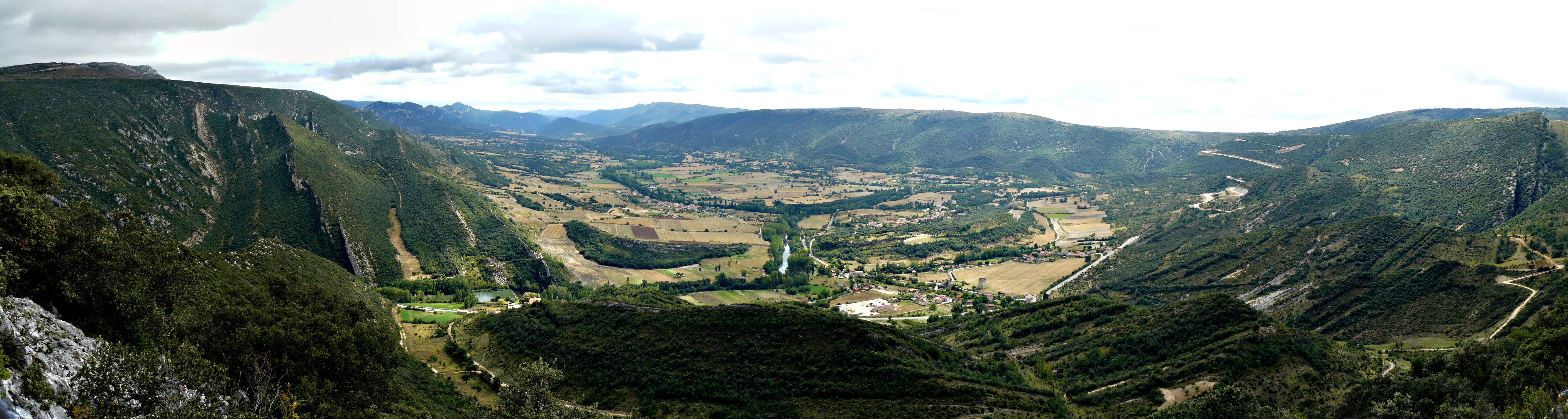 Valle de Valdivielso, Burgos.